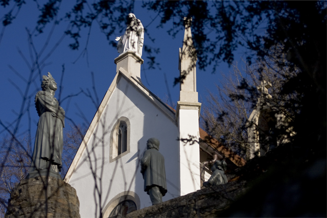 La Chapelle domine le village